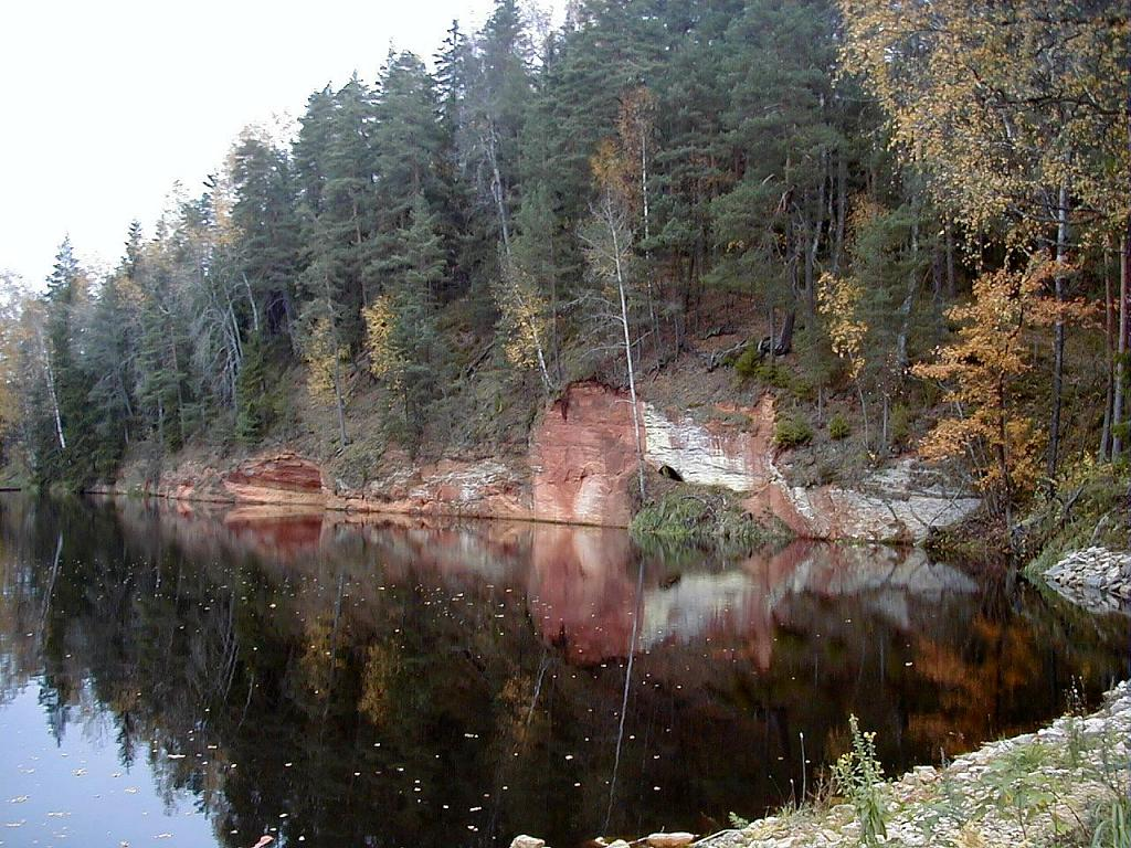 Aņītes Garais iezis pie Braslas ūdenskrātuves 2001-10-14